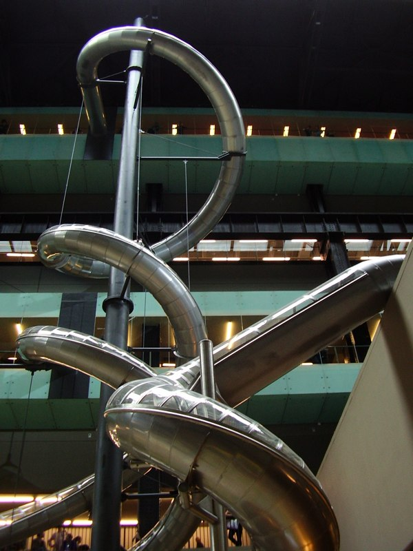 Zelf gemaakt